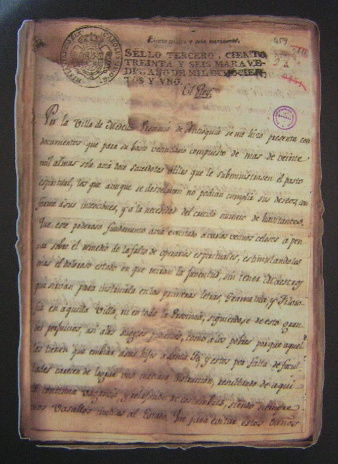 Real Cédula del 9 de febrero de 1801, en el cual, el rey Carlos IV autoriza la creación del Colegio de Franciscanos, que luego da origen a la Universidad de Antioquia. Medellín, Colombia.